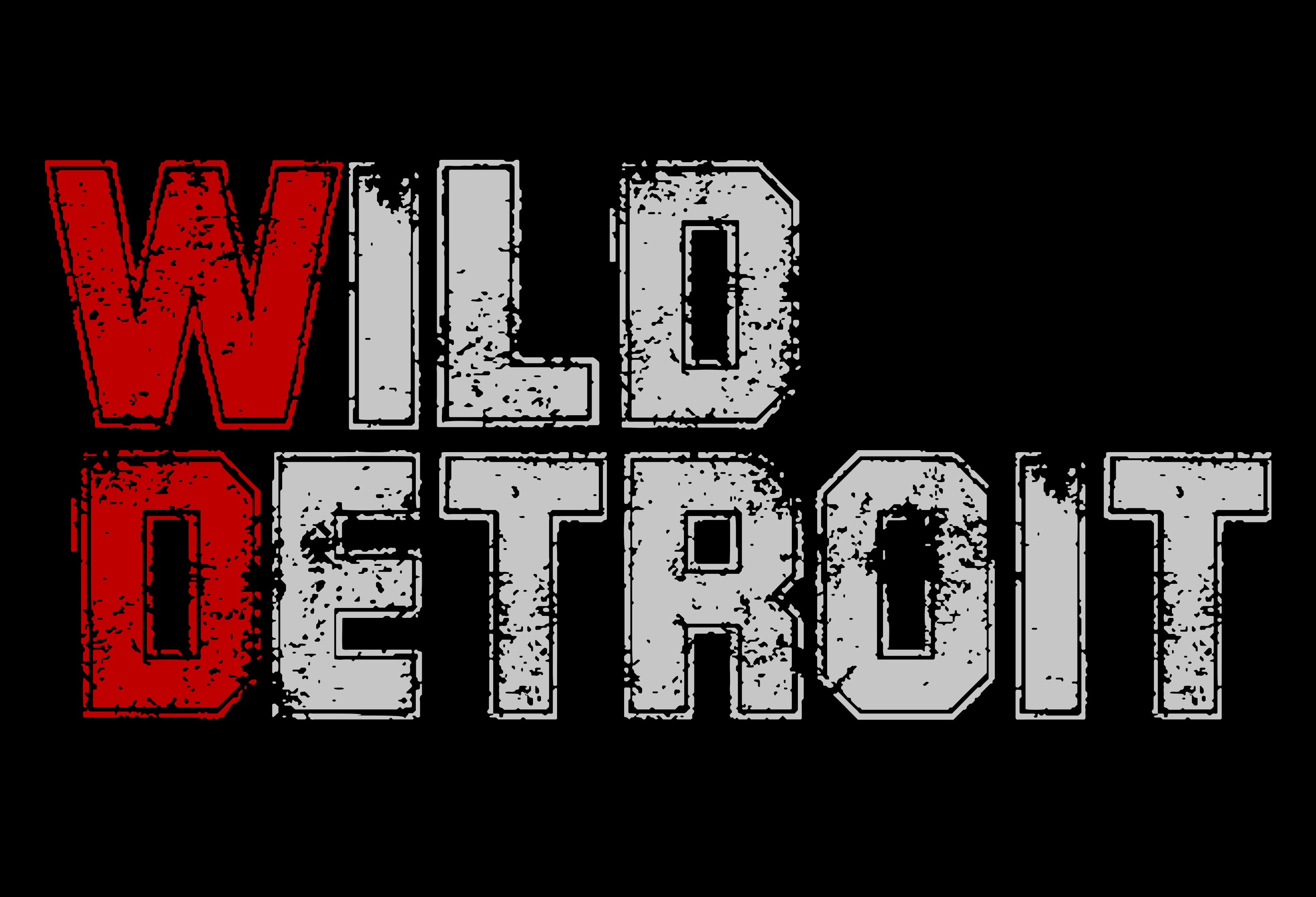 Wild Detroit logotips kopš 2019.gada jūlija